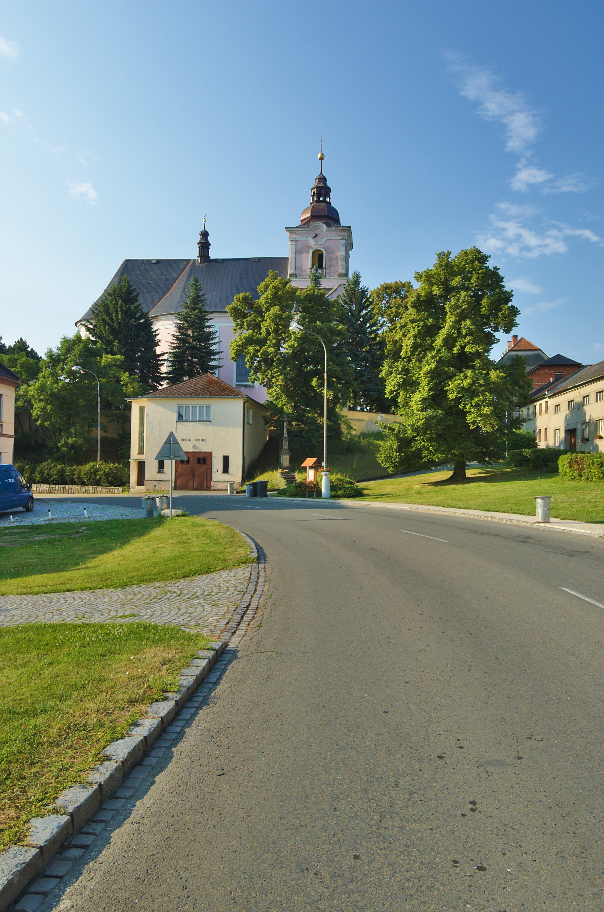 Hasičská zbrojnice a kostel Nanebevzetí Panny Marie, Slatinice, okres Olomouc